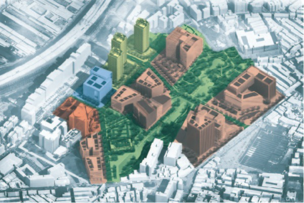 中文（台灣）: 台北遠東通訊園區(Tpark)位於新北市板橋區，緊鄰亞東醫院捷運站，佔地24公頃，為遠東紡織廠板橋廠轉型，計畫提供40萬平方公尺的研發辦公室，邀請通訊、雲端、綠能及數位內容相關研發產業進駐，結合台灣通訊產業群聚的效應與台灣優秀人才供給鏈，達到建立全球通訊研發中心的願景。